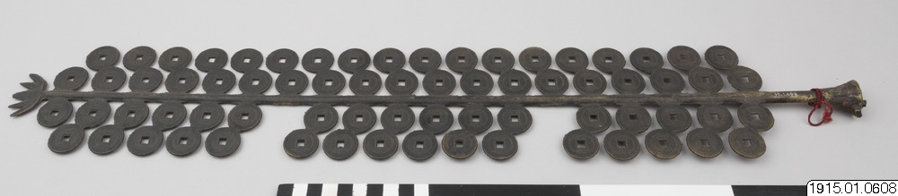 1915.01.0608 China Mynt som visar hur cash ser ut innan de separerats och polerats efter gjutning. Troligen lyckobringade amulett. Thorild Wulffs resa till Kina, Japan och Indonesien (1912-1914).